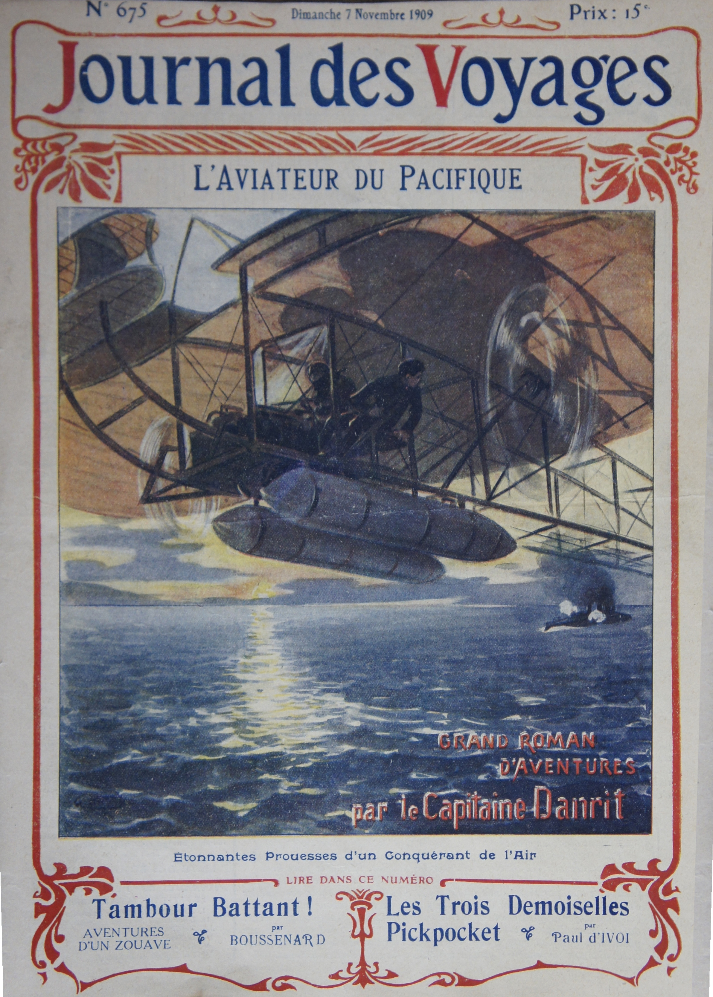 Couverture du Journal des voyages N° 675 où Danrit a fait paraitre une nouvelle .